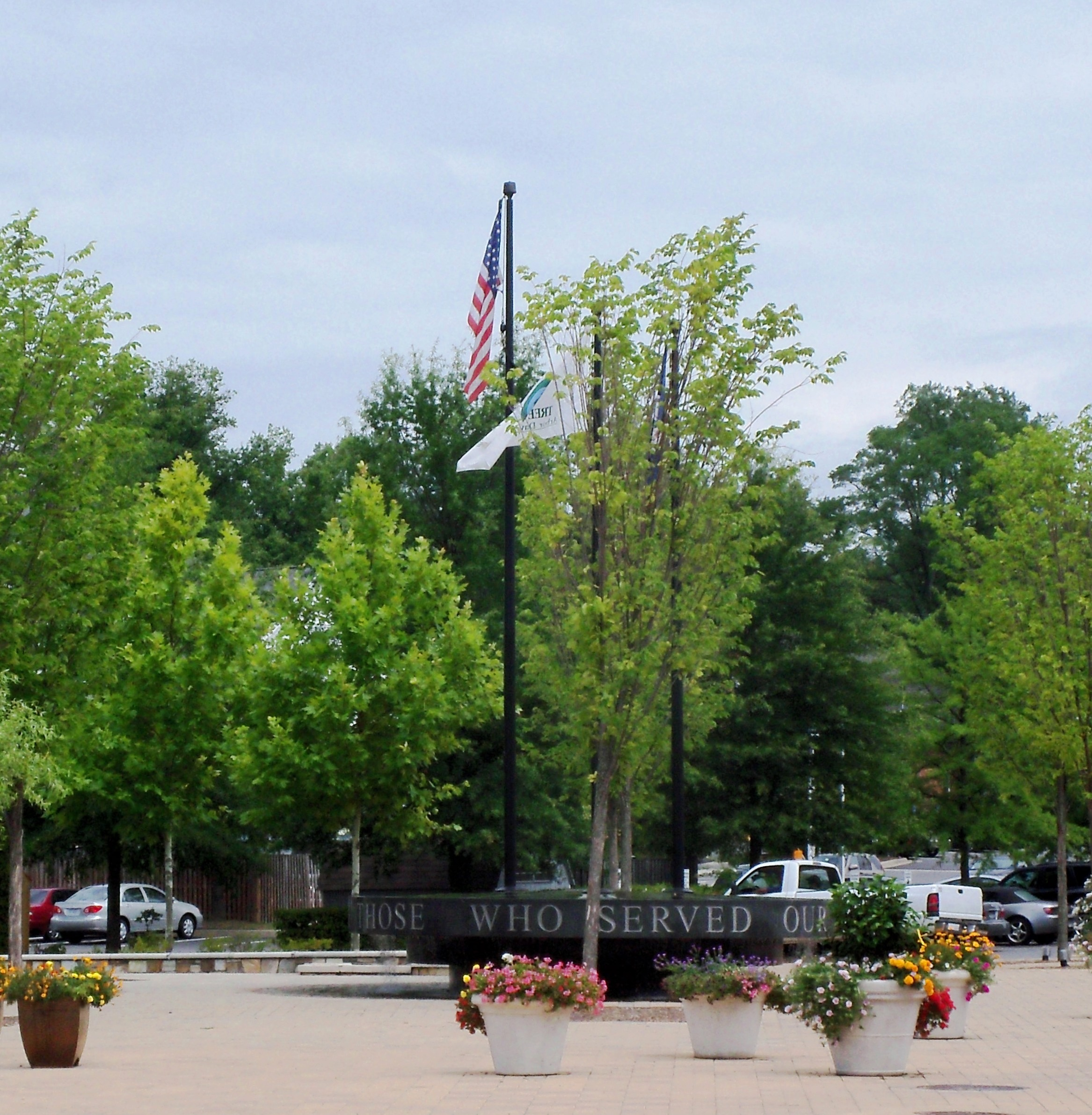 Vienna, VA 22180, USA